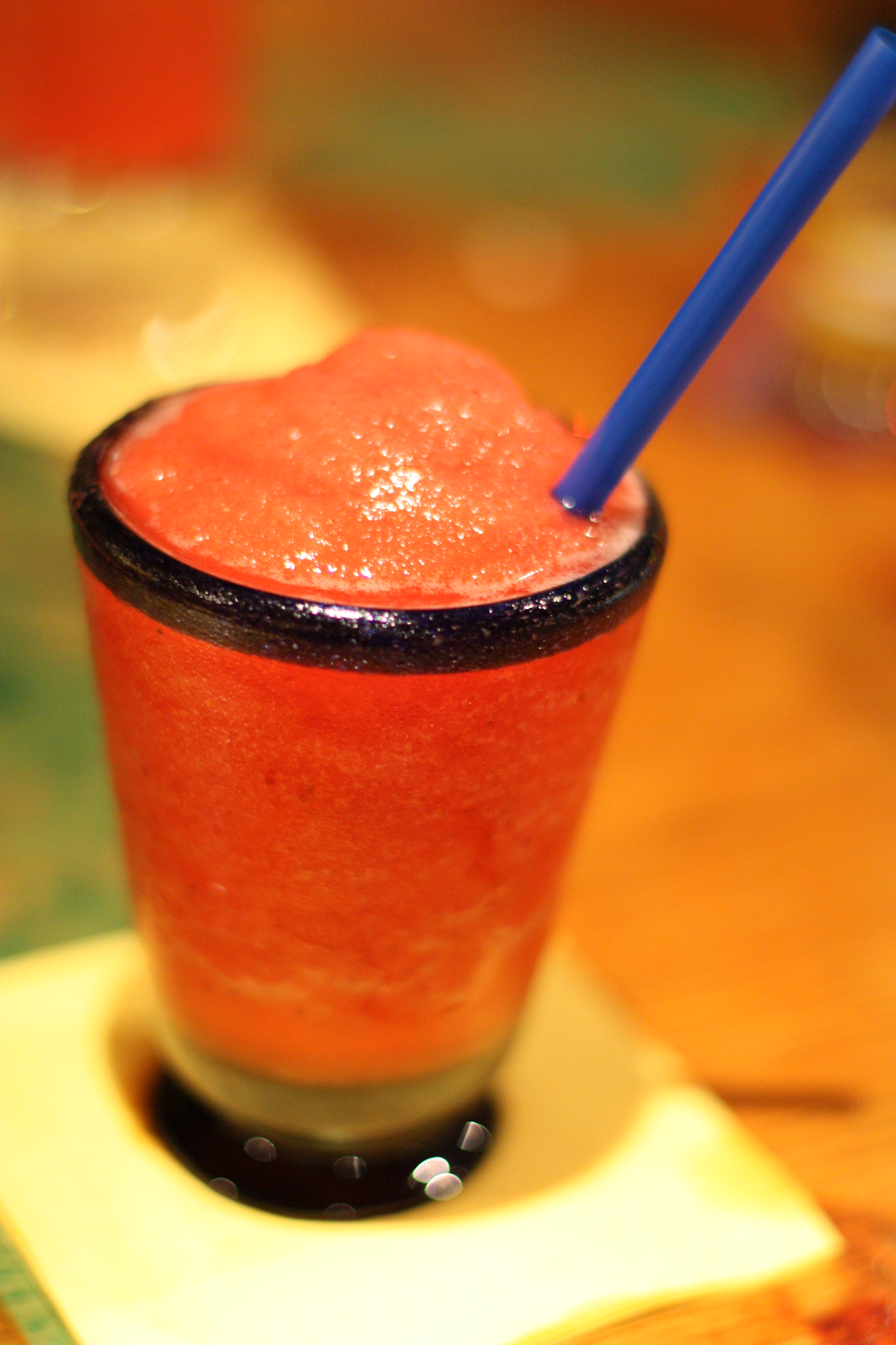 Cocktails